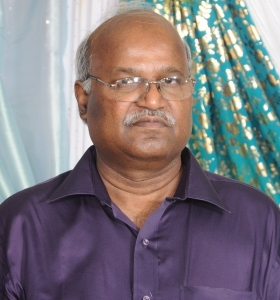 Depicted person: Gunasekaran Paramasamy – academic